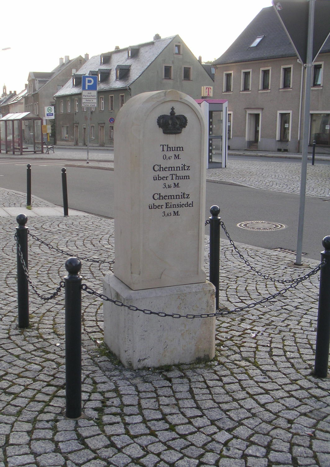 kgl.-sächs. Stationsstein in Ehrenfriedersdorf am Neumarkt